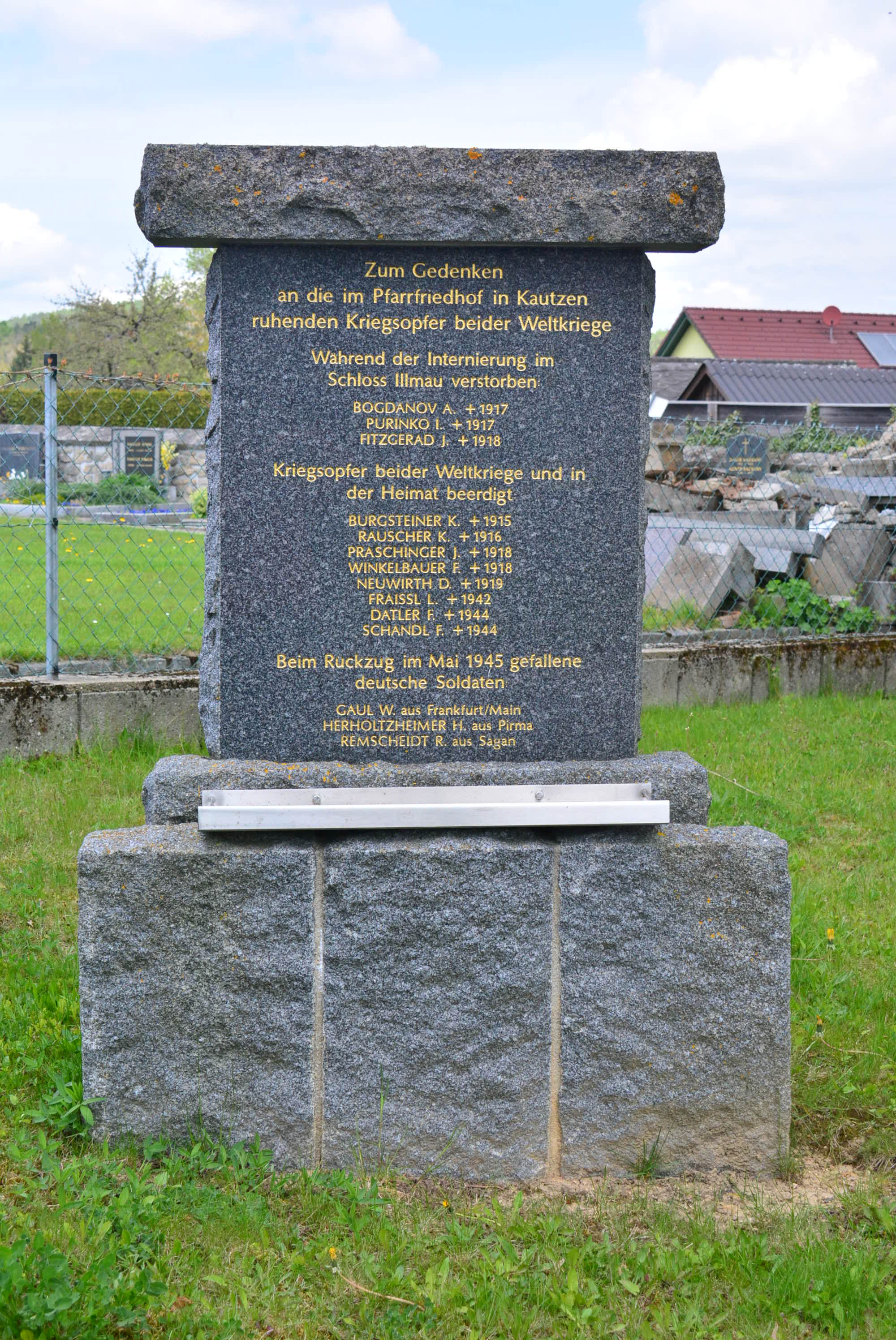 Denkmal für Kriegsopfer in Kautzen in Niederösterreich beim Friedhof